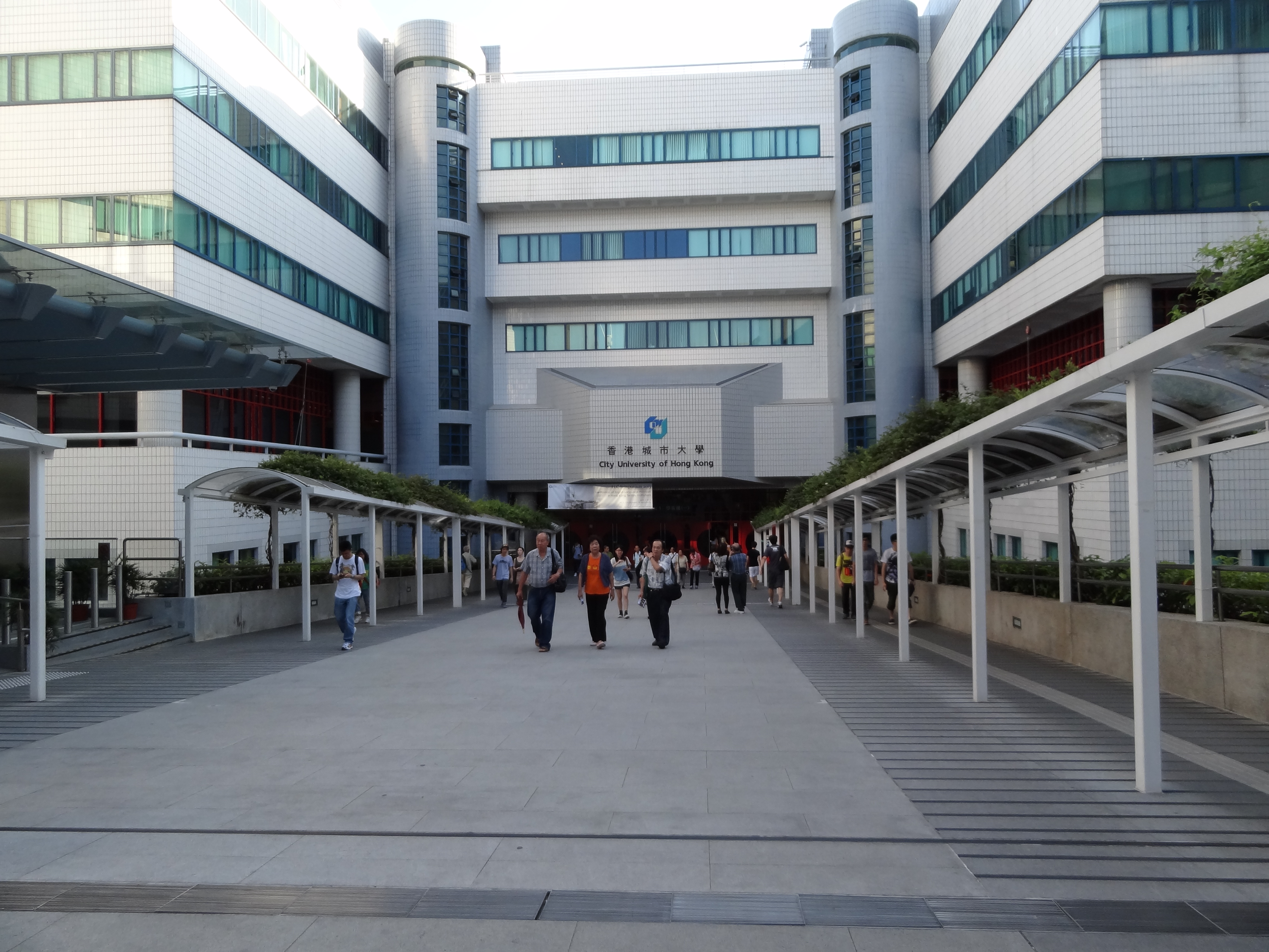 CityU Entrance